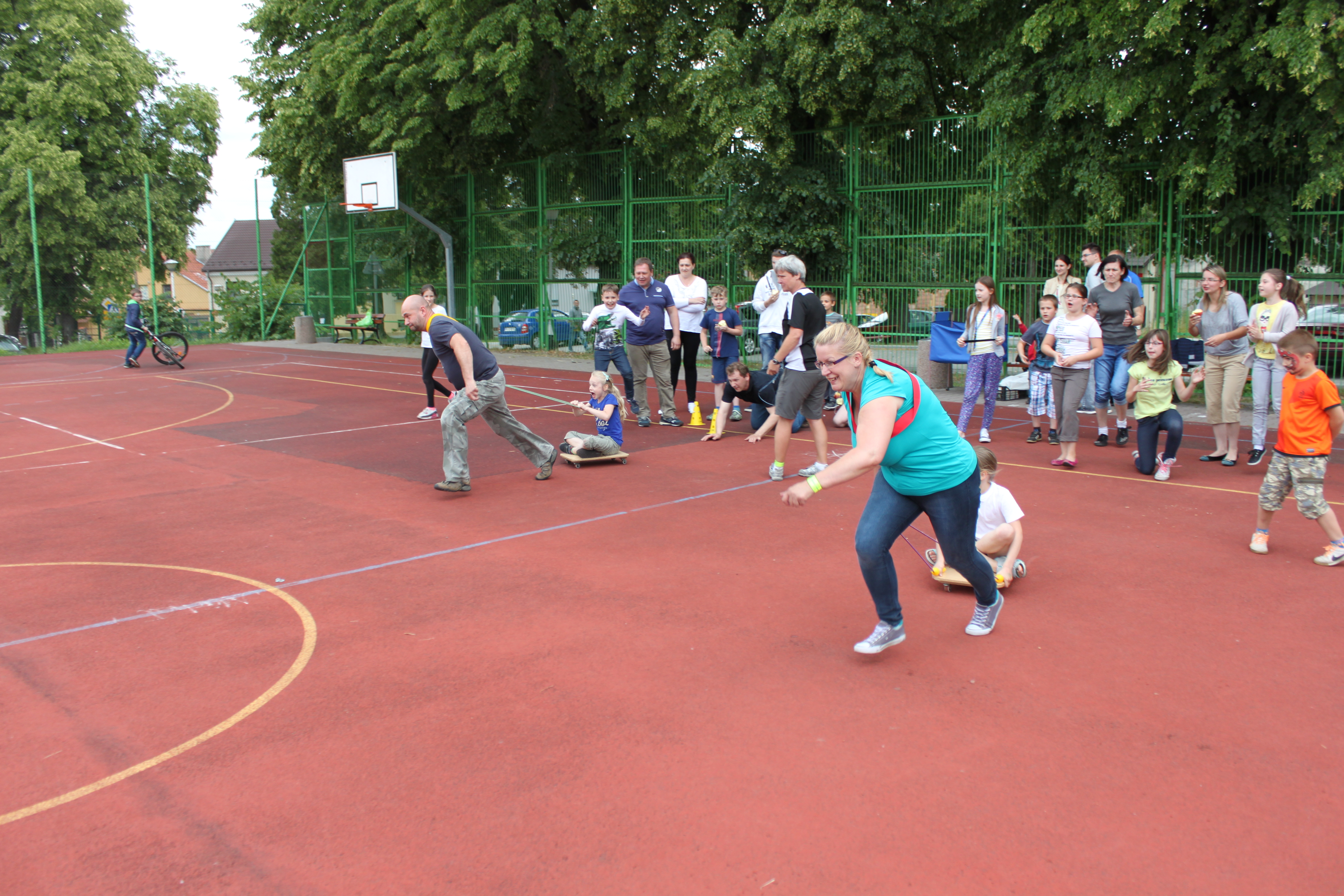 Piknik Rodzinny w czerwcu 2015 przy SP nr 1 w Leżajsku - wyścigi wózków